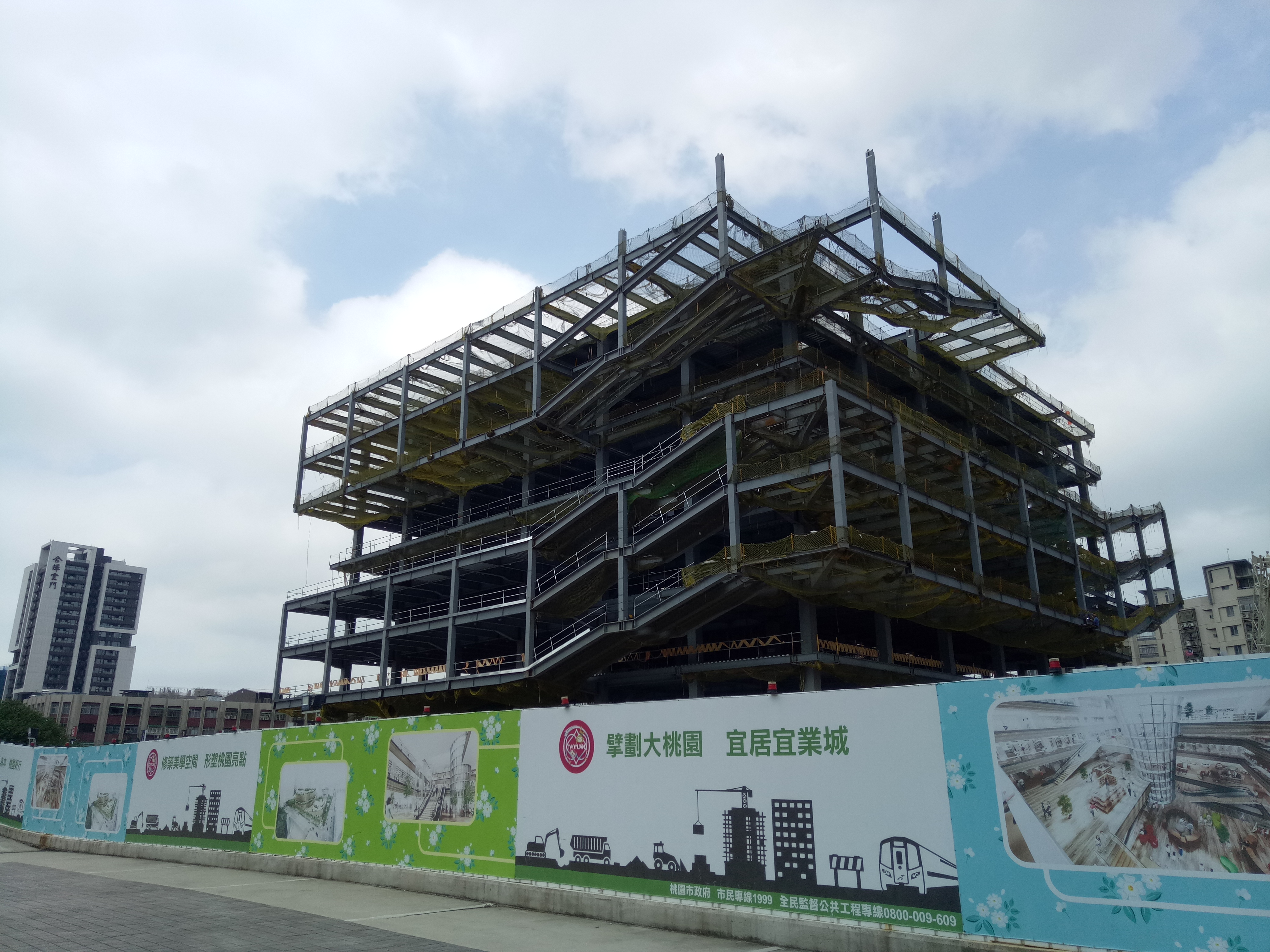 興建中的桃園市立圖書館新總館。（2020年6月）